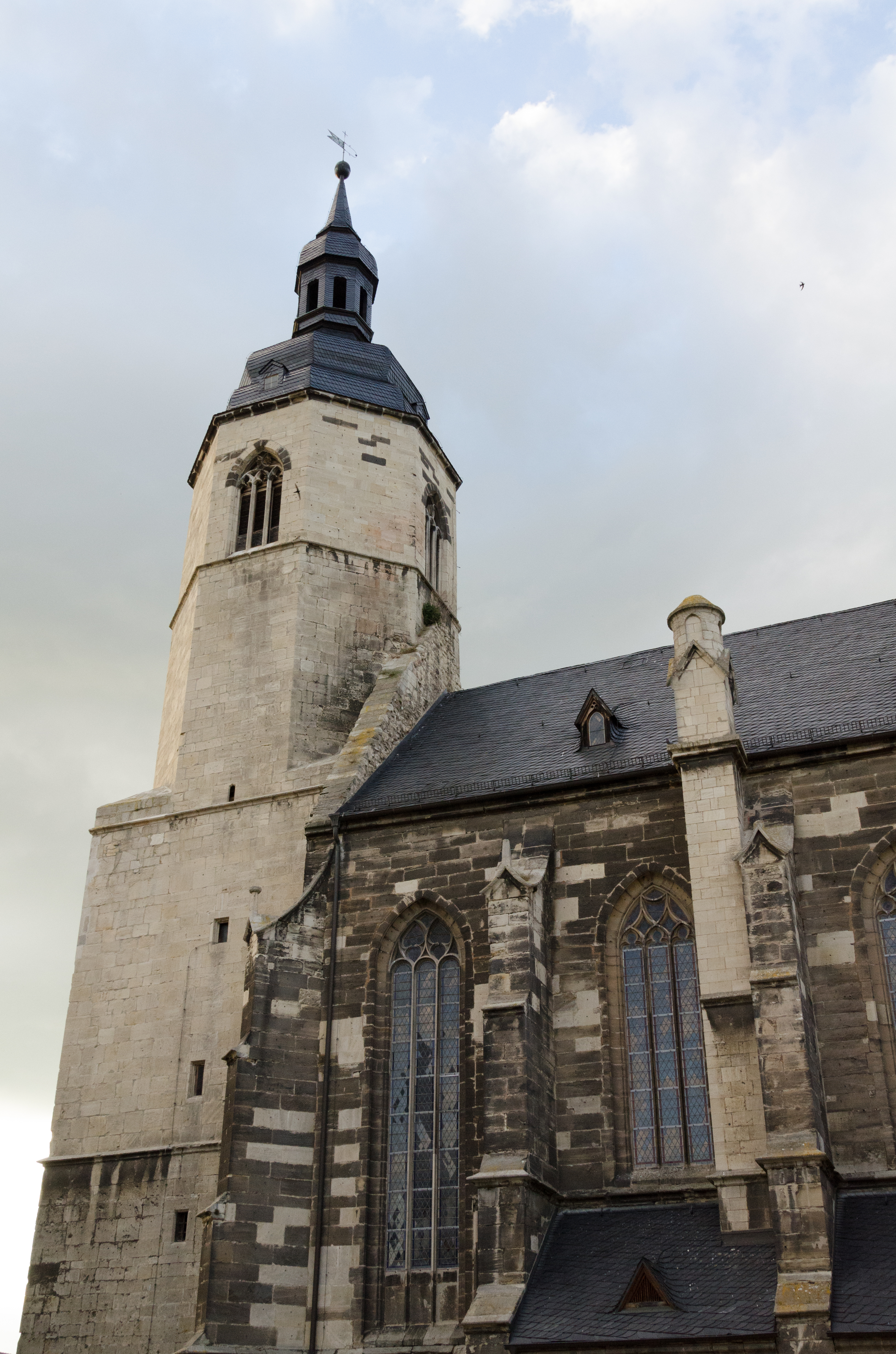 Laucha an der Unstrut, Stadtkirche St. Marien